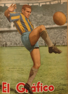 Humberto Rosa